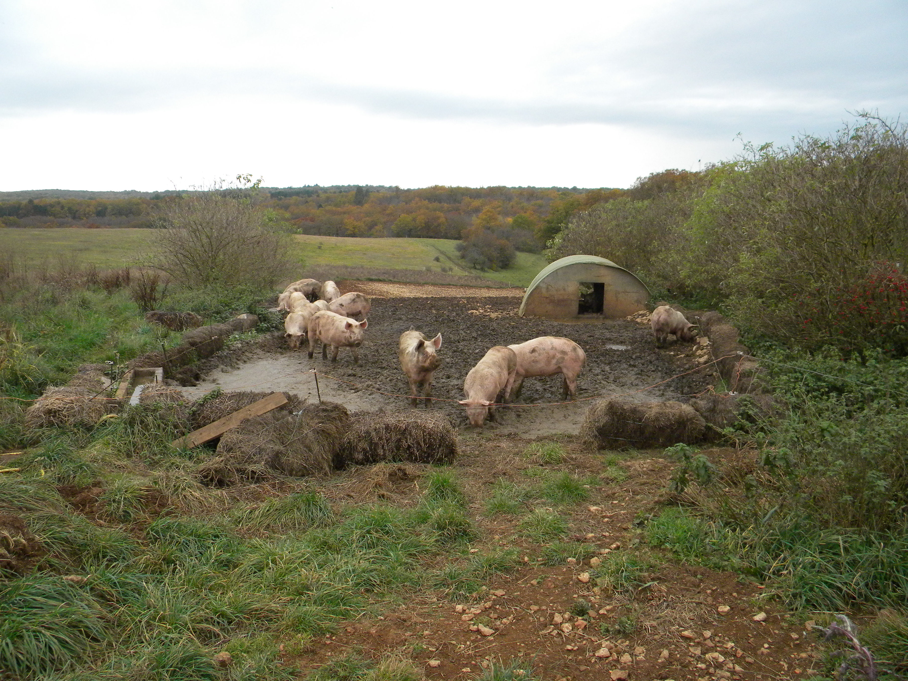 Ferme de la levée